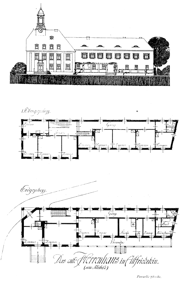 Radebeul, Gebäudeplan Altfriedstein, 1903